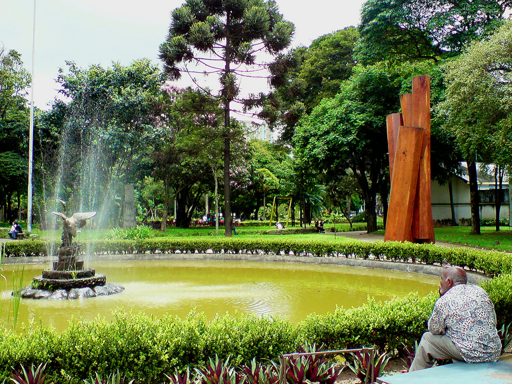 Mais uma do aniversário de São Paulo. Um dia especial, pelo passeio, pela companhia. Aprendi com o tempo que amores de verdade duram para sempre. Alguns a gente quer de verdade perto para sempre.